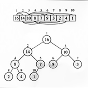 Gomila struktura podataka